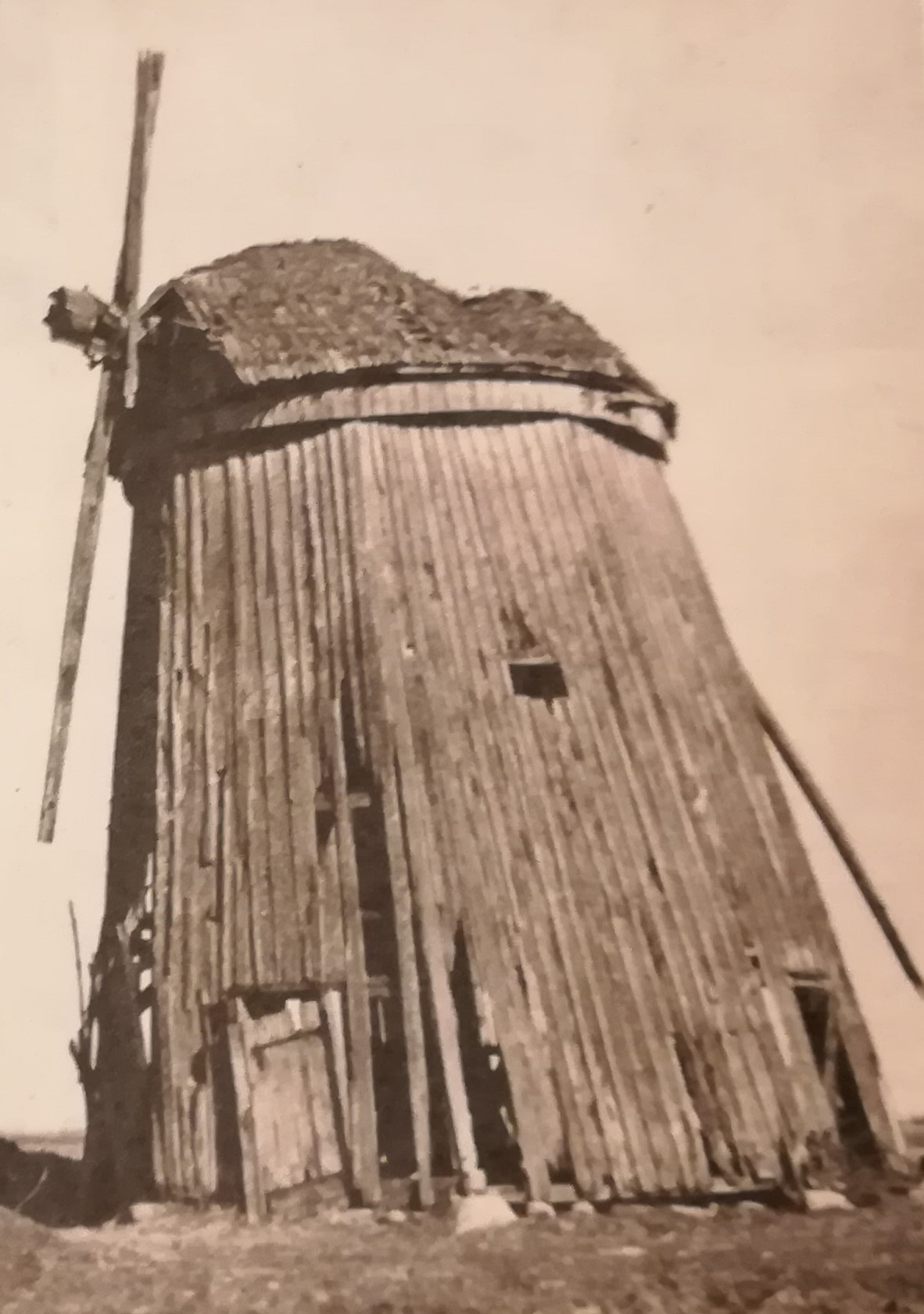 Wiatrak w miejscowości Chodorówka Stara. Rozebrany przed 1981r.